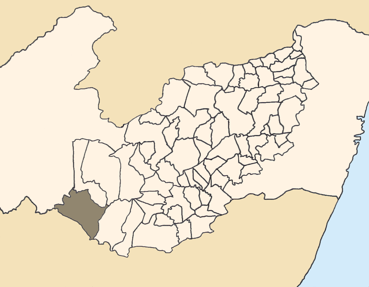 Mapa da mesorregião Agreste de Pernambuco (Brasil) subdivida em municípios. Em destaque, o município de Itaíba. Map of the brazilian state of Pernambuco (mesorregião Agreste) showing the city of Itaíba. Imagem tratada com o GIMP. Image made with GIMP.